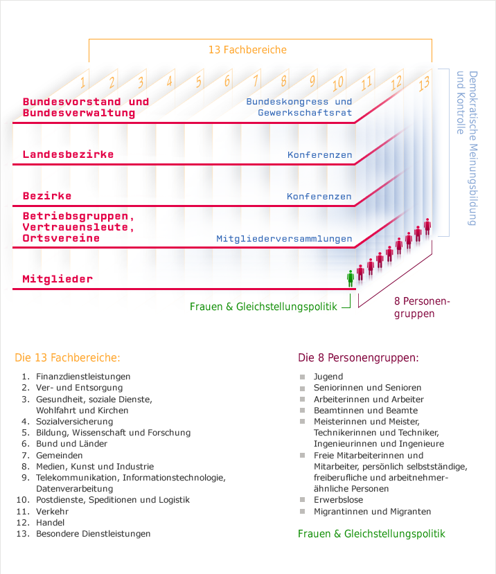 Infografik: So arbeitet ver.di